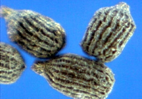 Samen von Drosera indica. Aufgenommen mit dem USB-Mikroskop bei 200-facher Vergrößerung